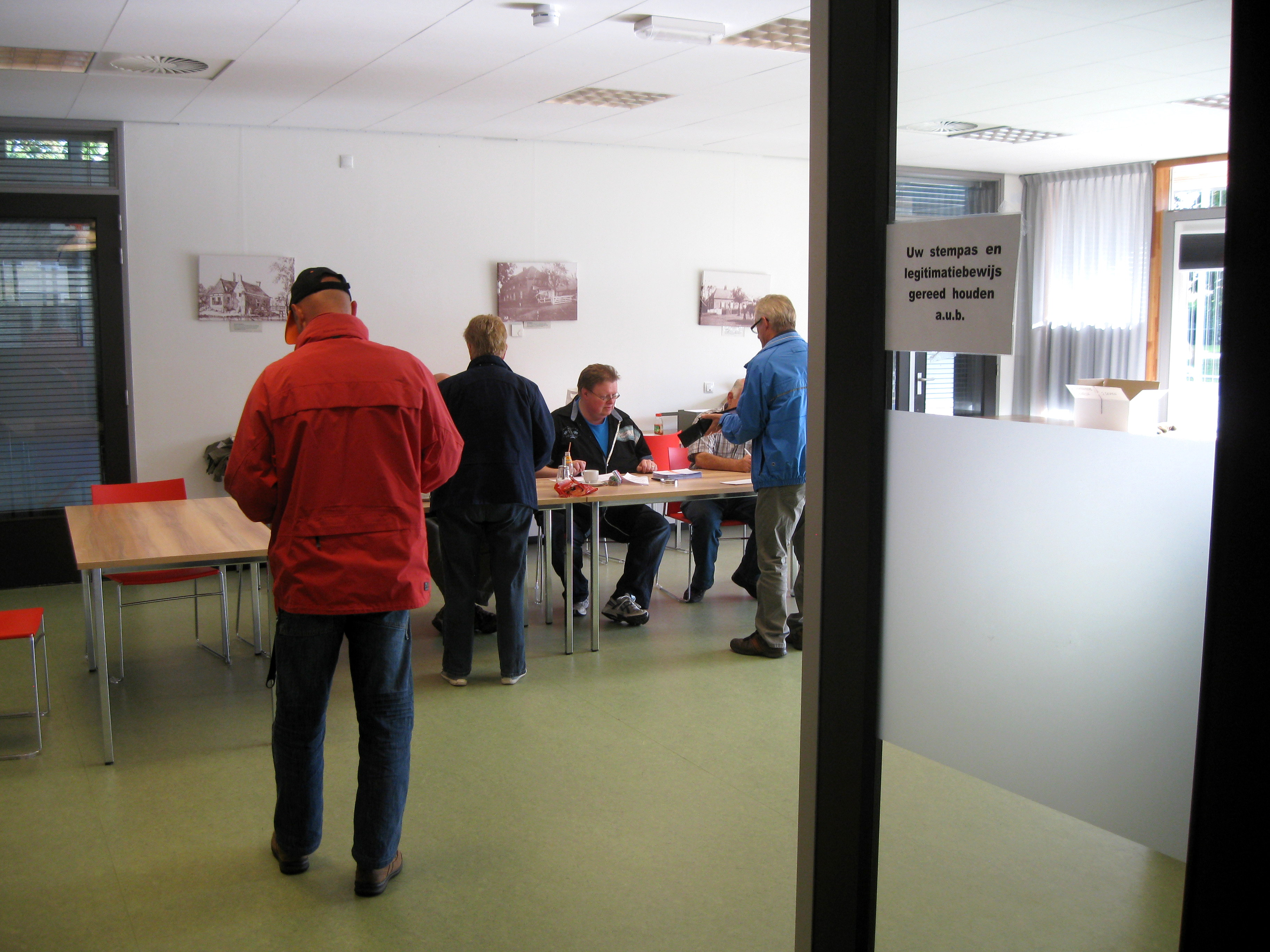 Verkiezingen Tweede Kamer 2012. Stemlokaal De Lichtenberg in Silvolde, Oude IJsselstreek.